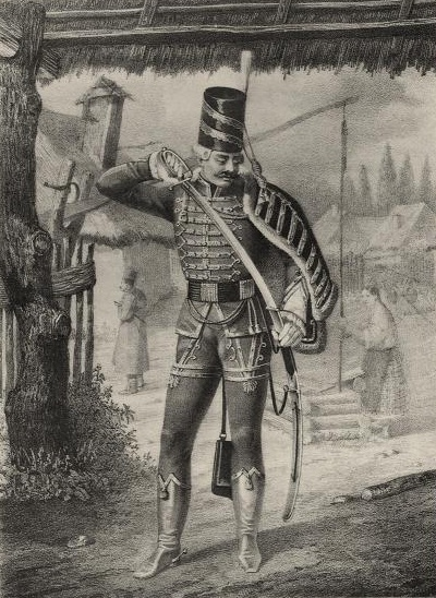 Обер-офицер Острогожского Гусарского полка, с 1776 по 1783 г.